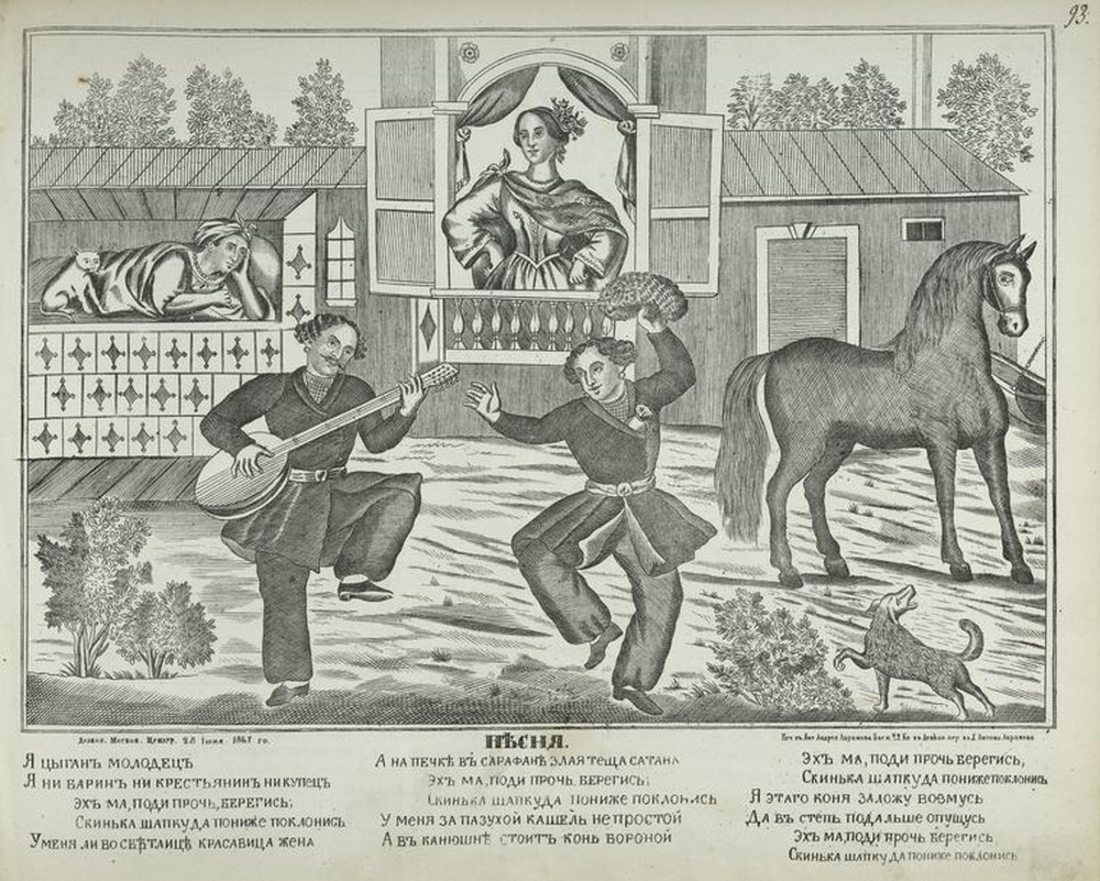 Песня «Я цыган молодец…». Лубок